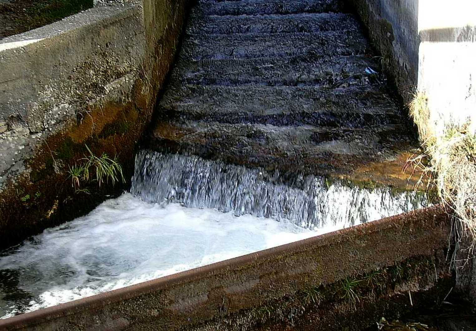 Mühlauer Bach Kehre